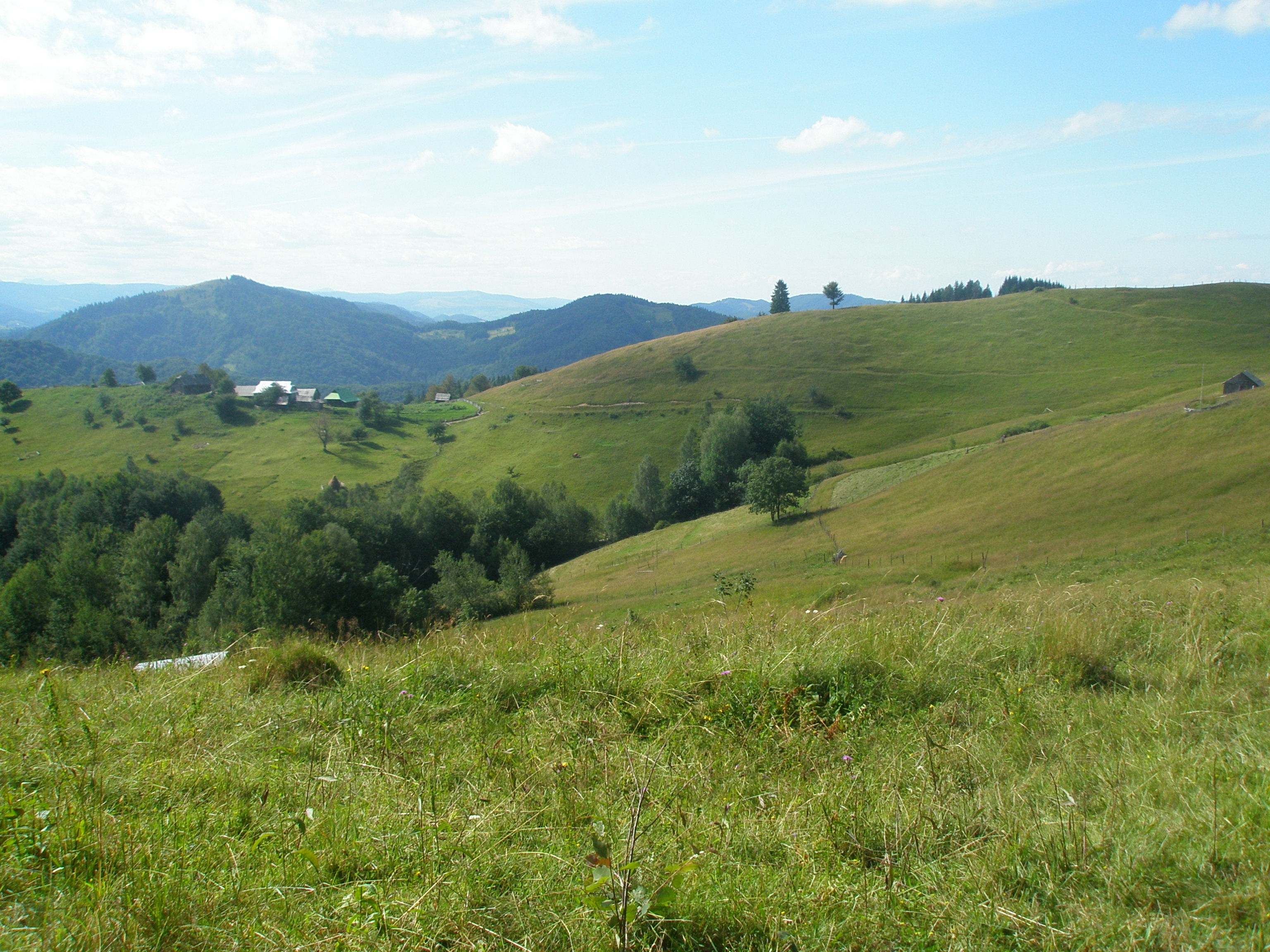 Сокільський хребет (Косівський район, Івано-Франківська обл., Україна): стежками Сокільського хребта